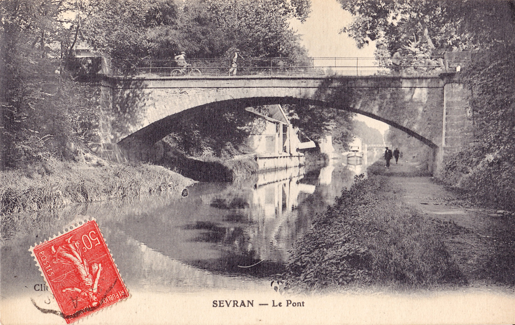 Carte postale ancienne sans mention d'éditeur :SEVRAN - Le Pont